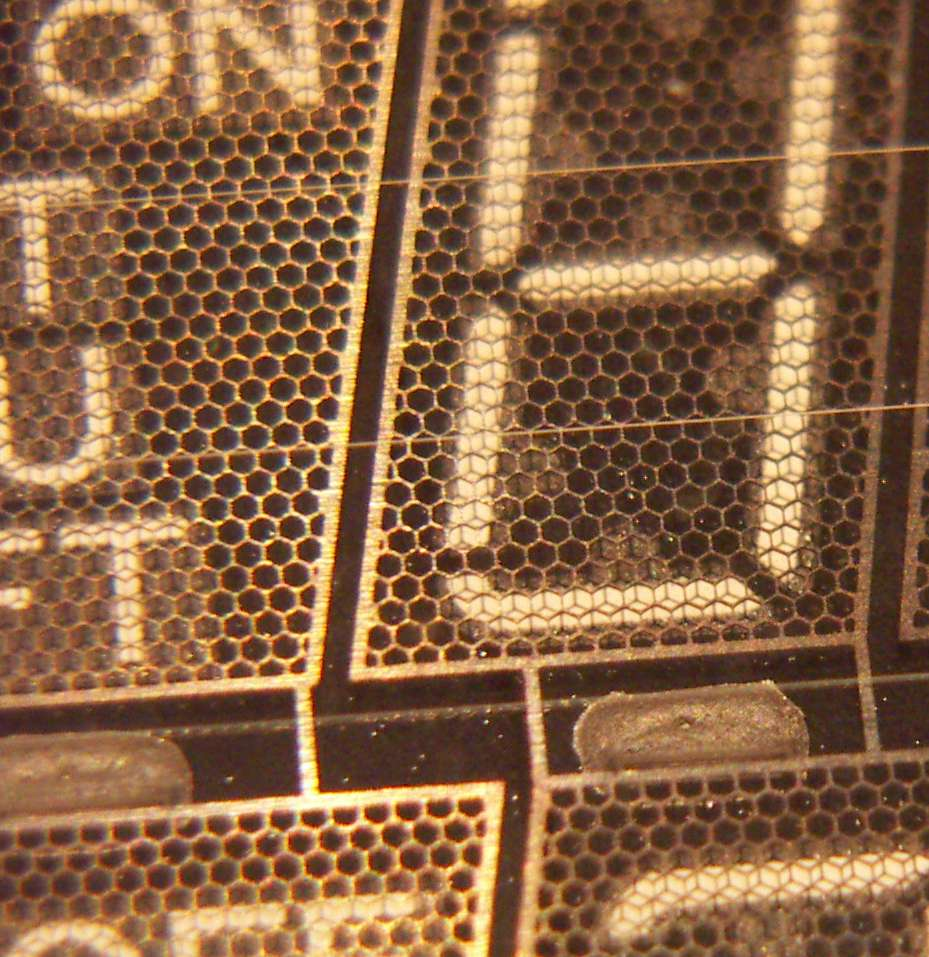 Lähikuva Luxorin videonauhurin tyhjiöfluorenssinäytöstä.